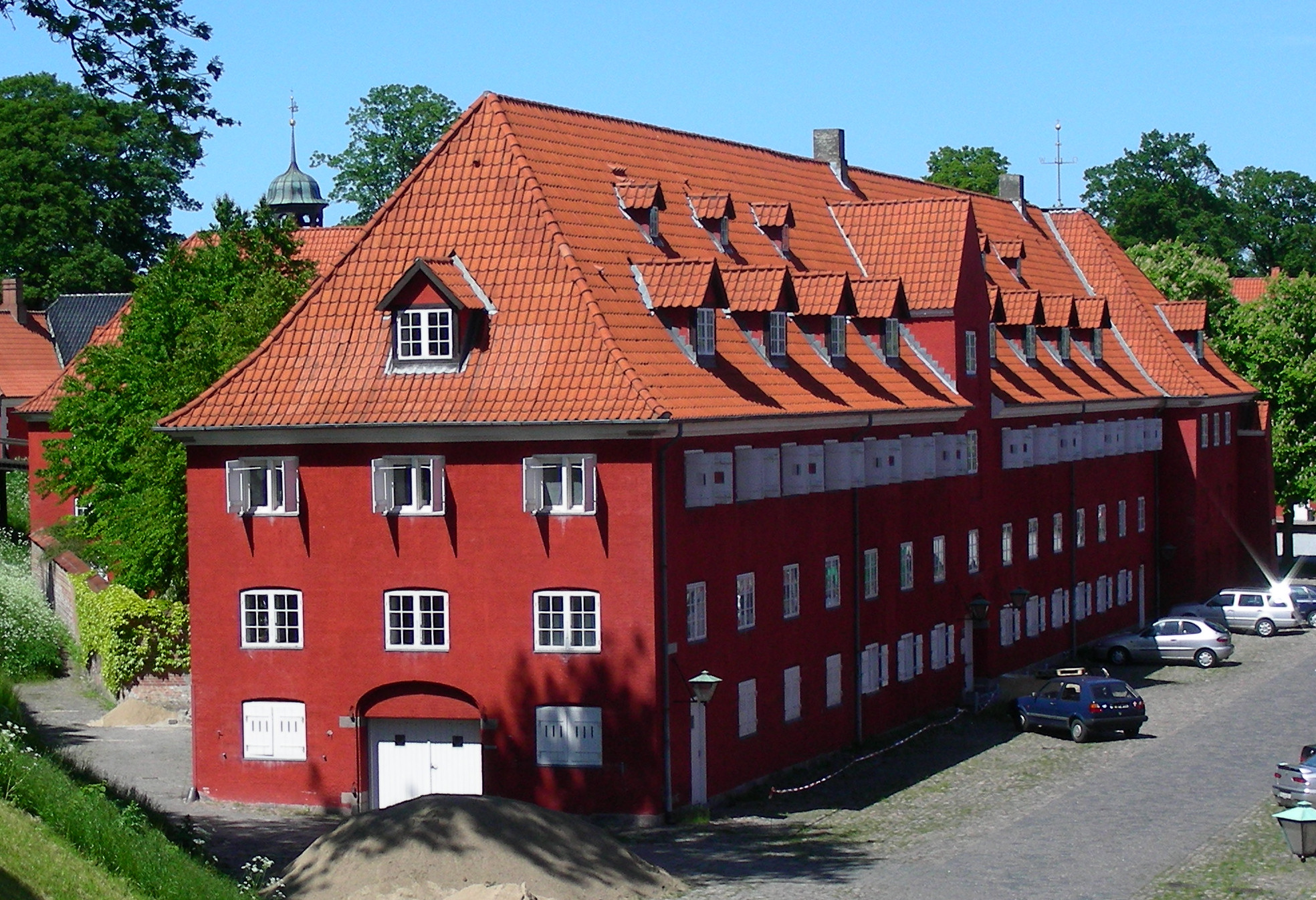 The Citadel of Copenhagen aka Kastellet. Søndre Magasin